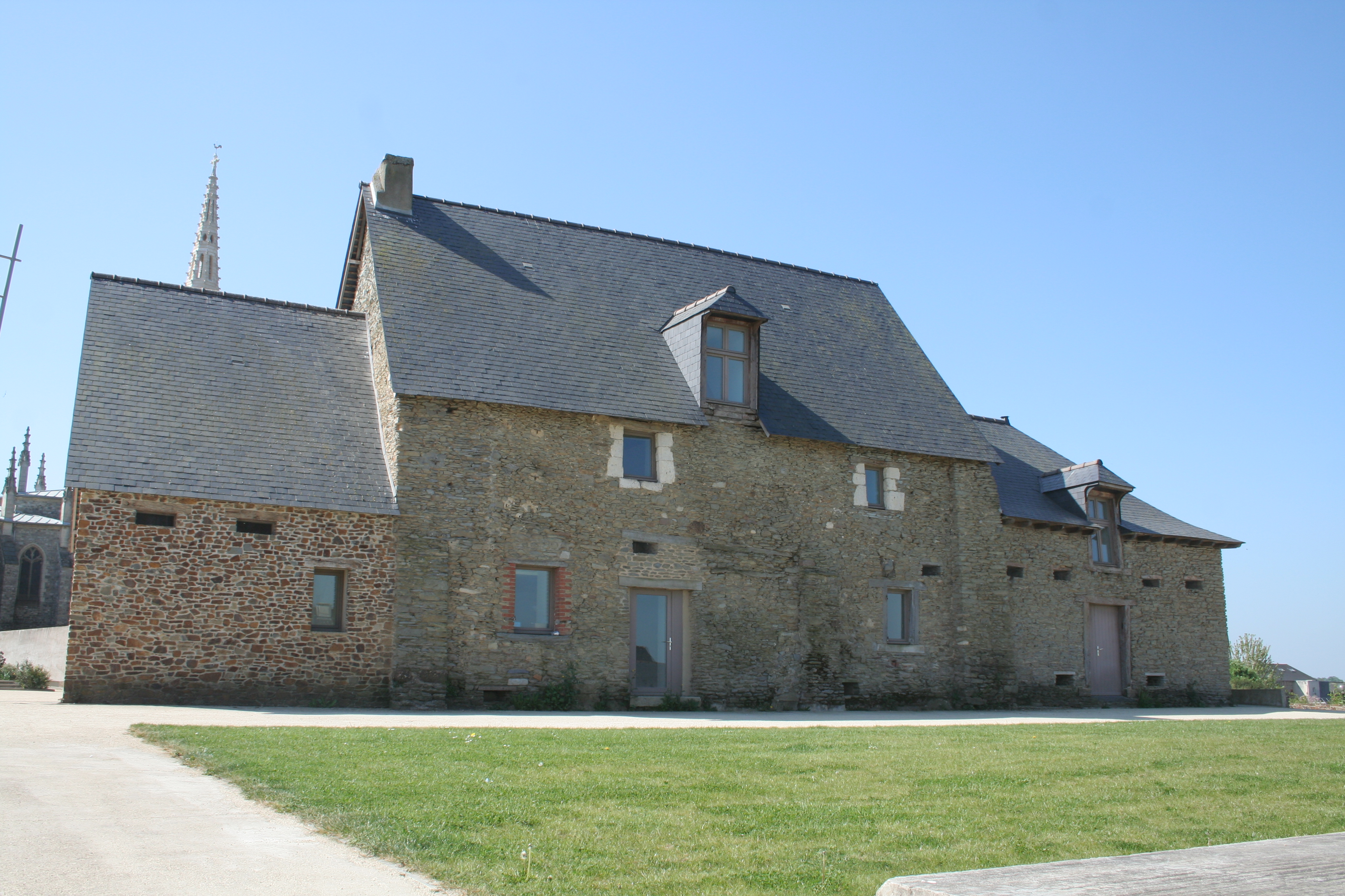 Noyal sur Vilaine, manoir de la Motte